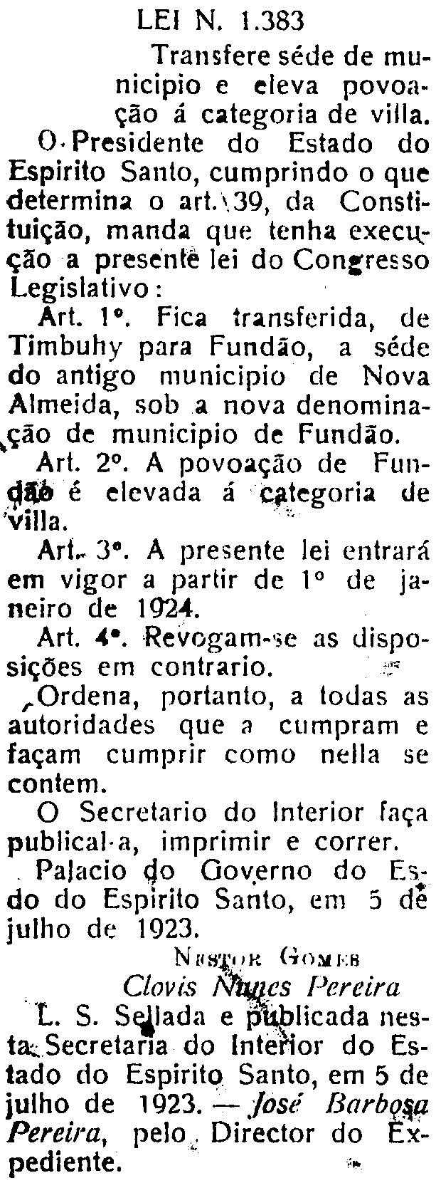 Lei 1.383 - Transfere sede de município e eleva povoação [Fundão] à categoria de vila. Diario da Manhã, Victoria, 6 de Julho de 1923, pg. 1